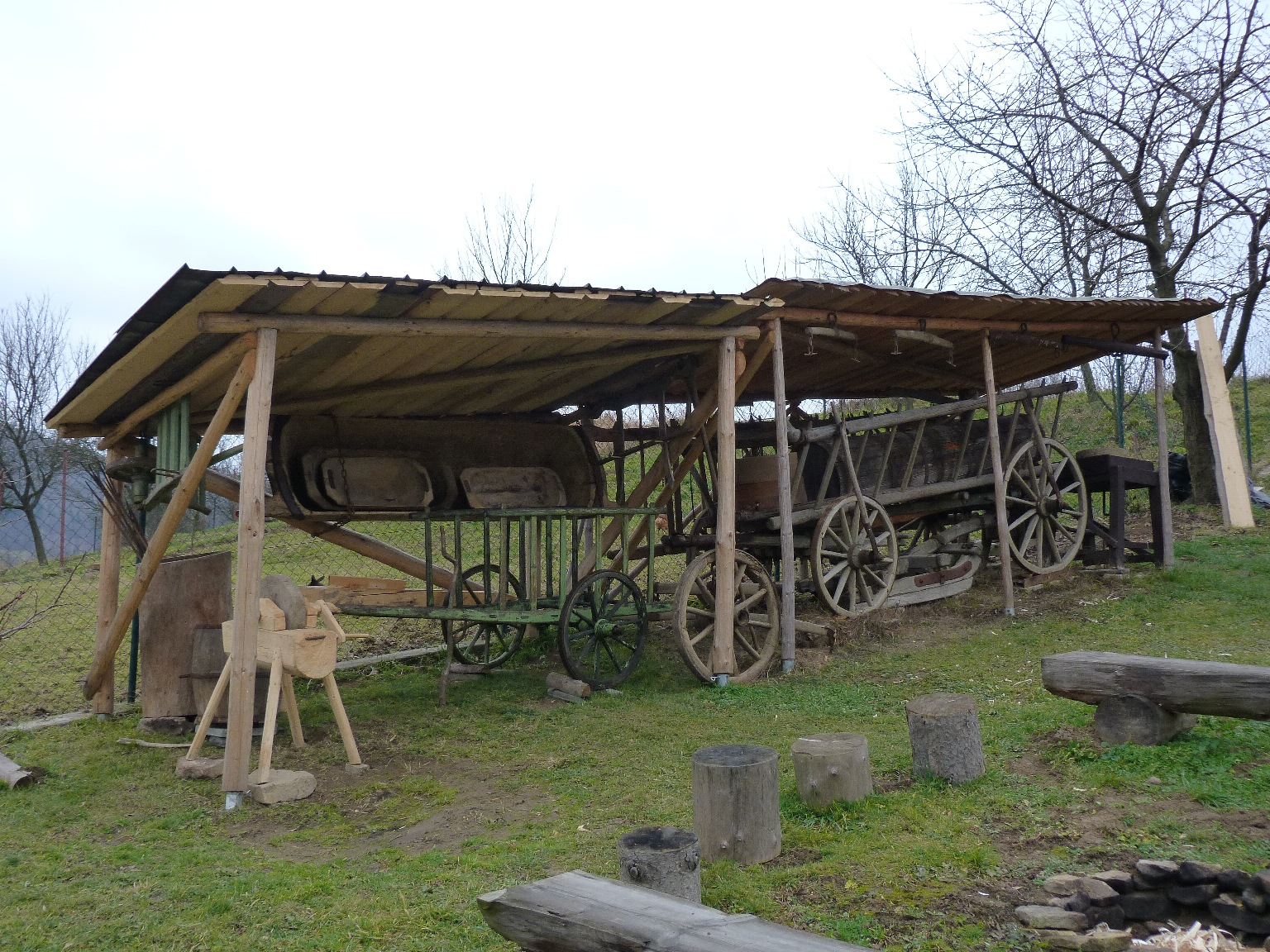 Muzeum dřevěného porculánu - žebřinový vůz